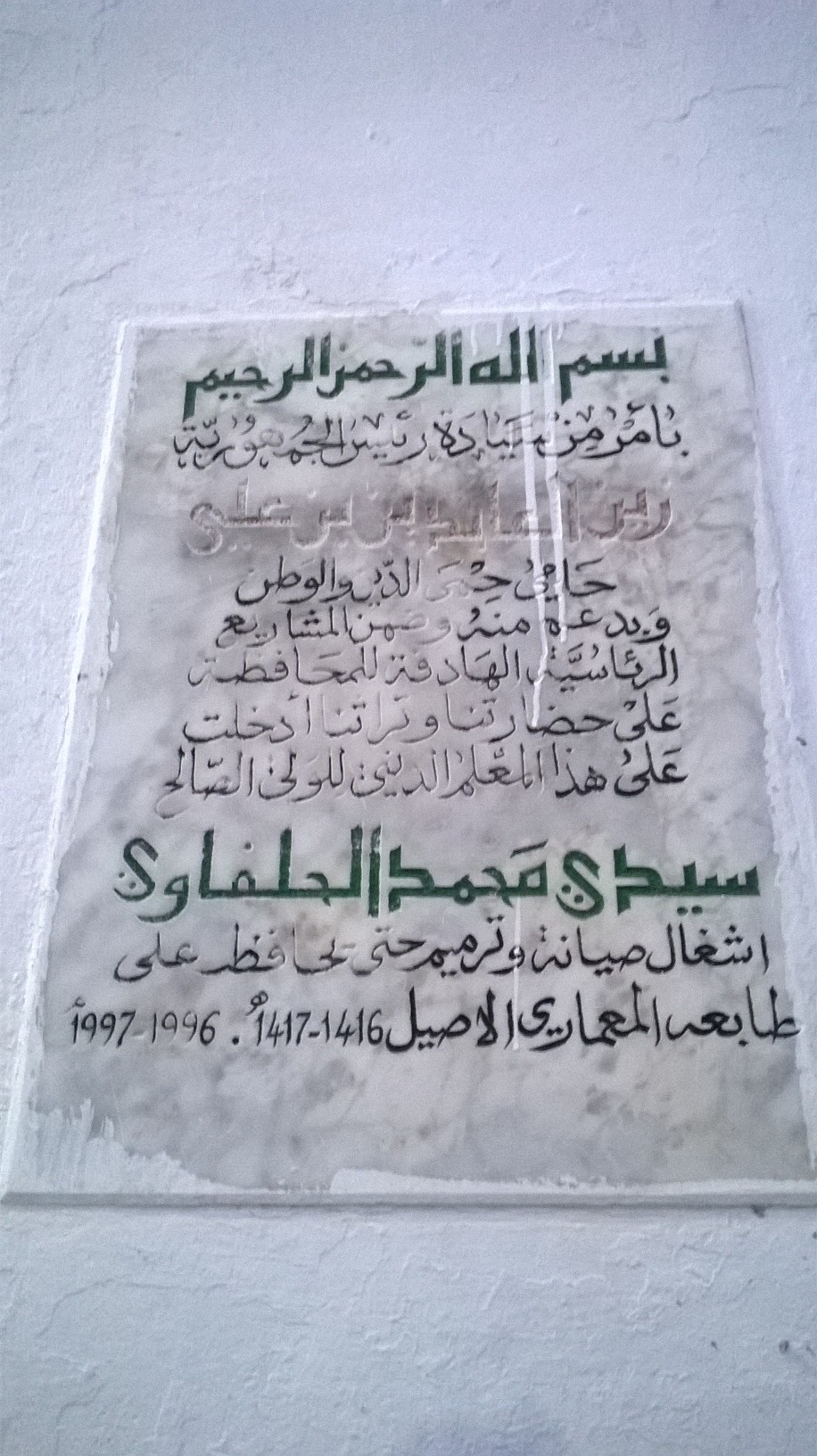 Bab El Khadra , la médina de Tunis